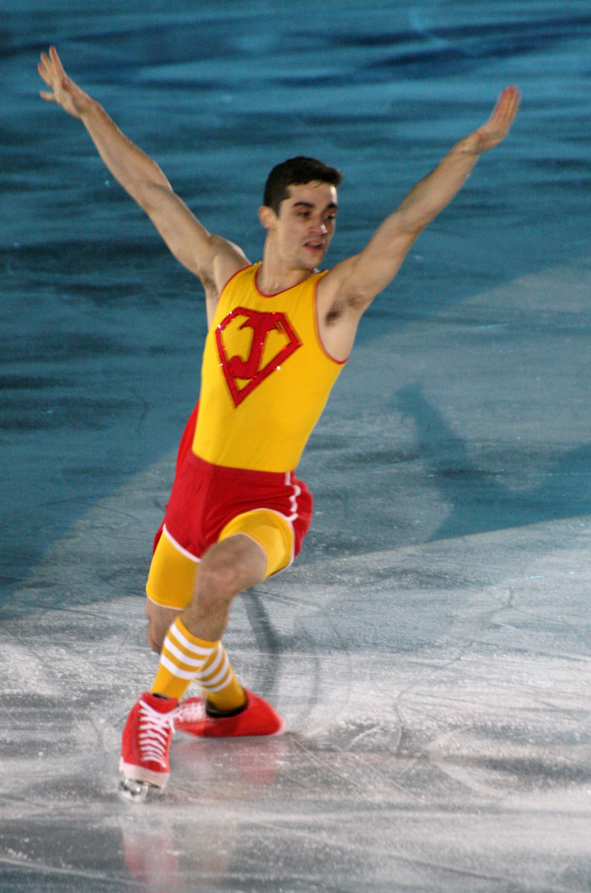 Хавьер Фернандес (Испания) на показательных выступлениях в финале Гран-при по фигурному катанию 2015-2016.